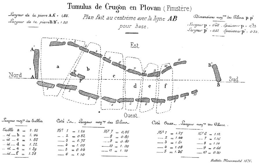 Plan du tumulus de Crugon en Plovan (dessin de Paul du Chatellier)